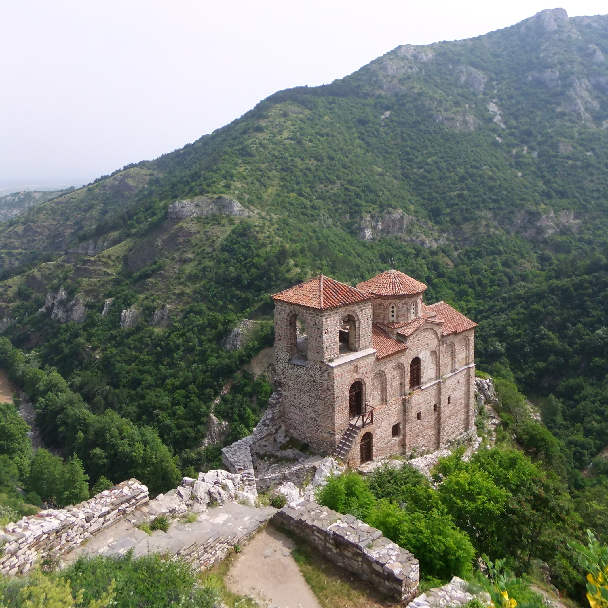 Bulgaria 2011 - 34.jpg